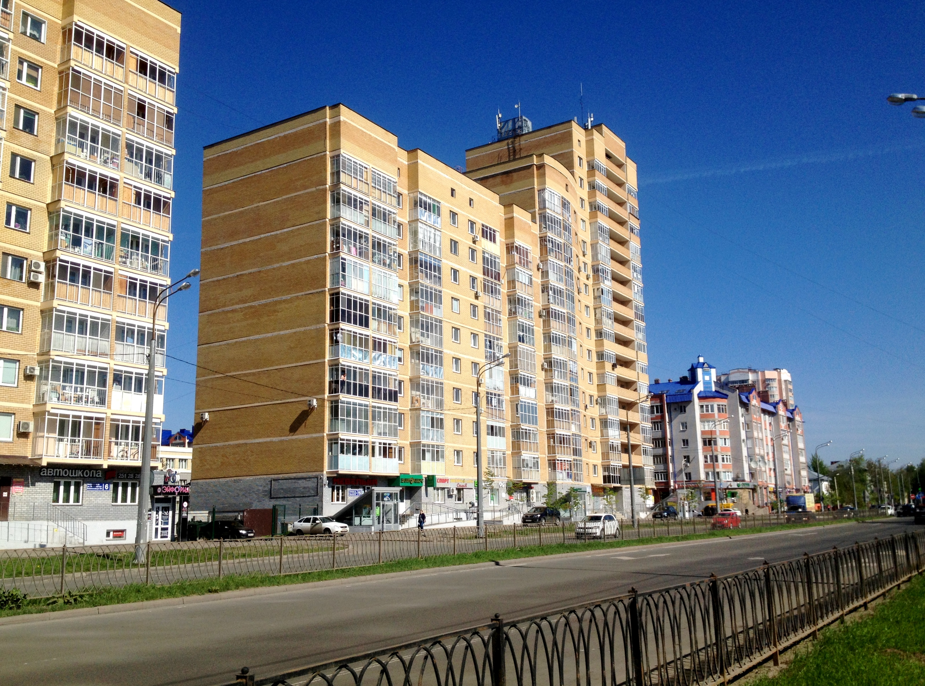 Участок улицы Ленинградской от улицы Симонова до улицы Айдарова (город Казань).